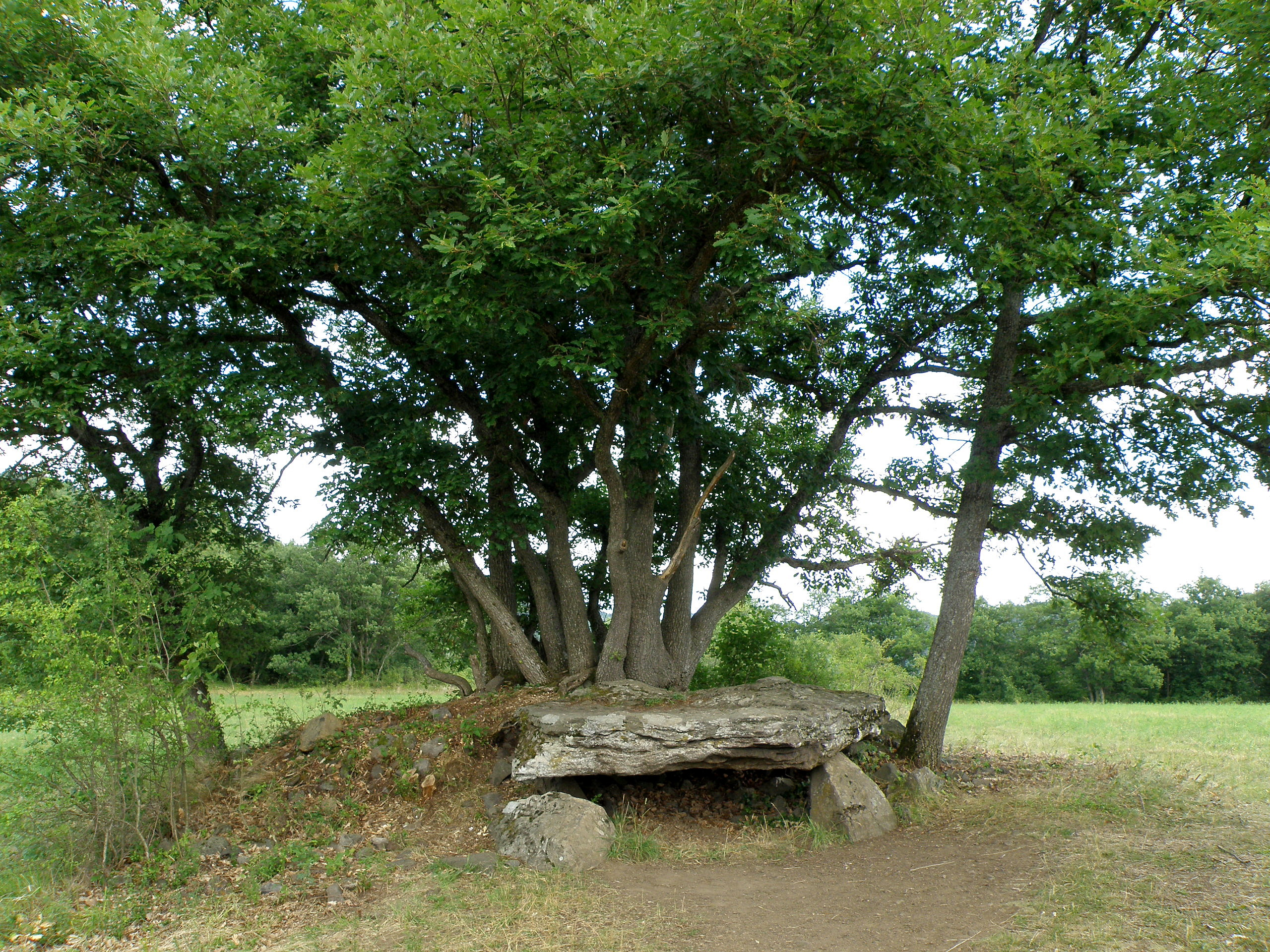 Saillant, village et ancienne commune du Puy-de-Dôme, aujourd’hui intégré dans la comm. de Saint-Nectaire. Dolmen de Saillant, dit aussi Palet de Roland, situé à 500 m. env. (à vol d'oiseau) à l'est-sud-est du village.